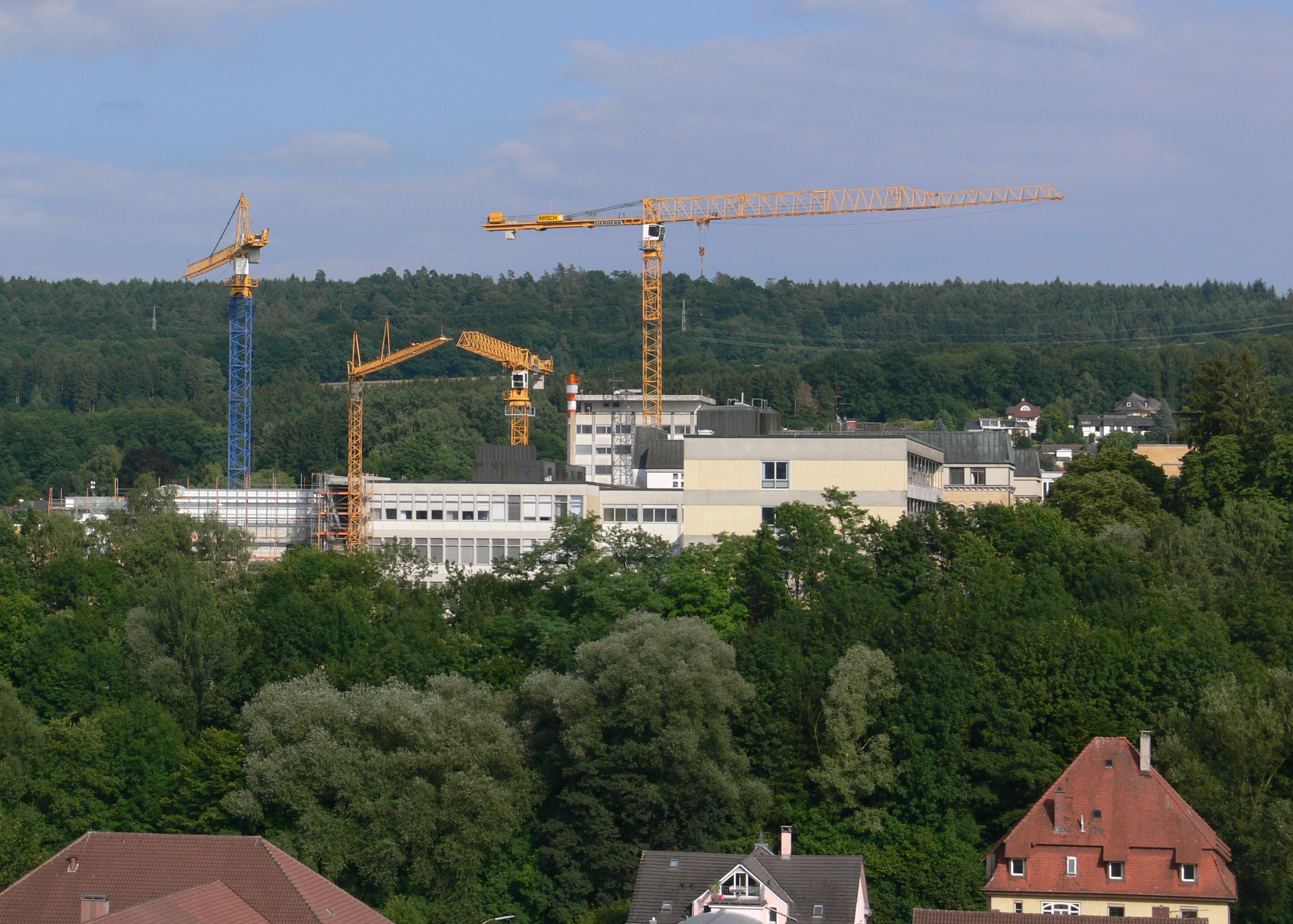 Ravensburg, Krankenhaus St. Elisabeth während des Umbaus, 2010